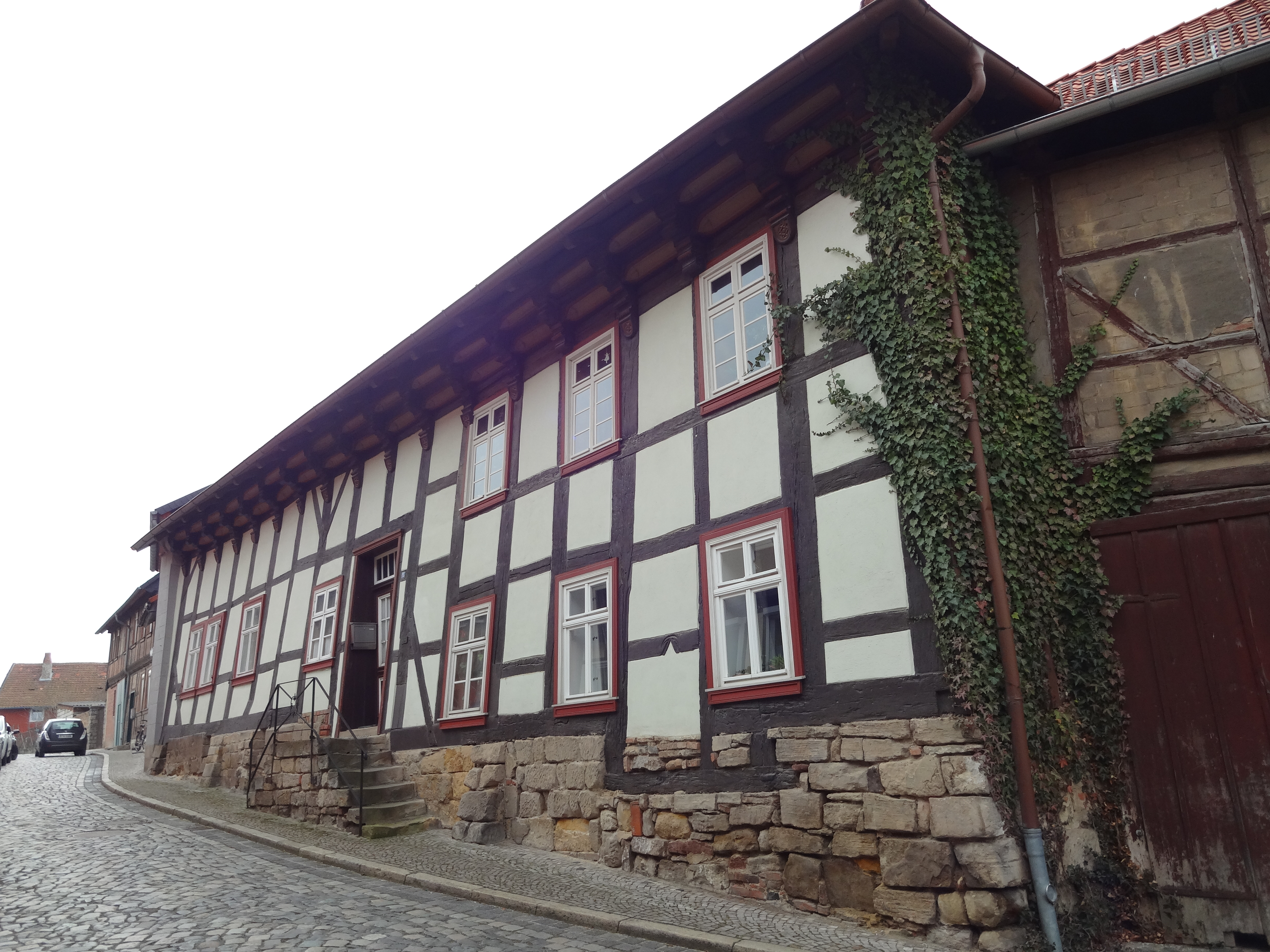 denkmalgeschütztes Fachwerkhaus in der Bergstraße 15 Derenburg, Ortsteil von Blankenburg (Harz)